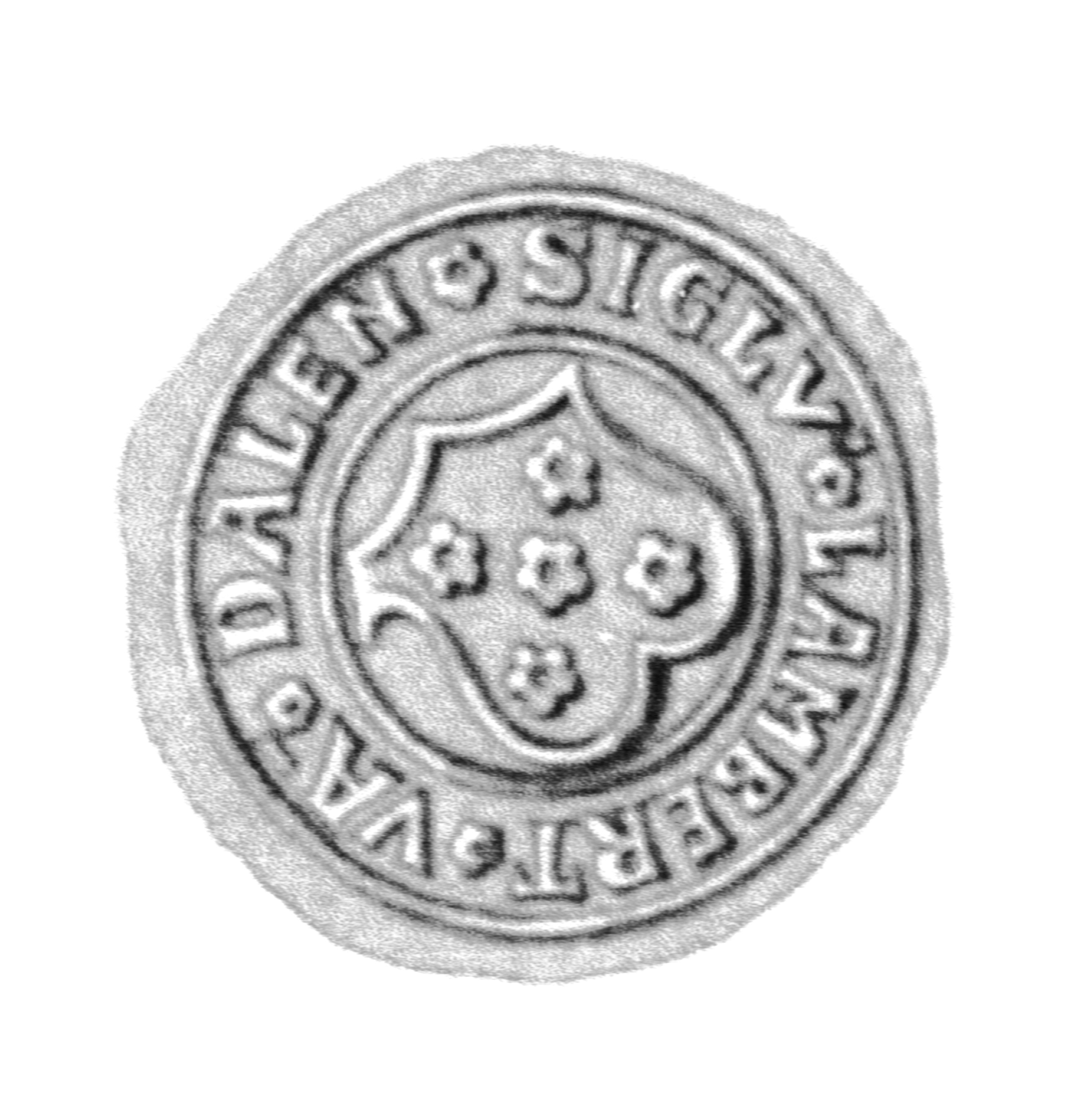 Siegel des Ratsmannes Lambert von Dalen. Das Siegel stammt aus der Zeit um 1550. Siehe Emil Ferdinand Fehling: Lübeckische Ratslinie, Nr. 650 (Lambert von Dalen).